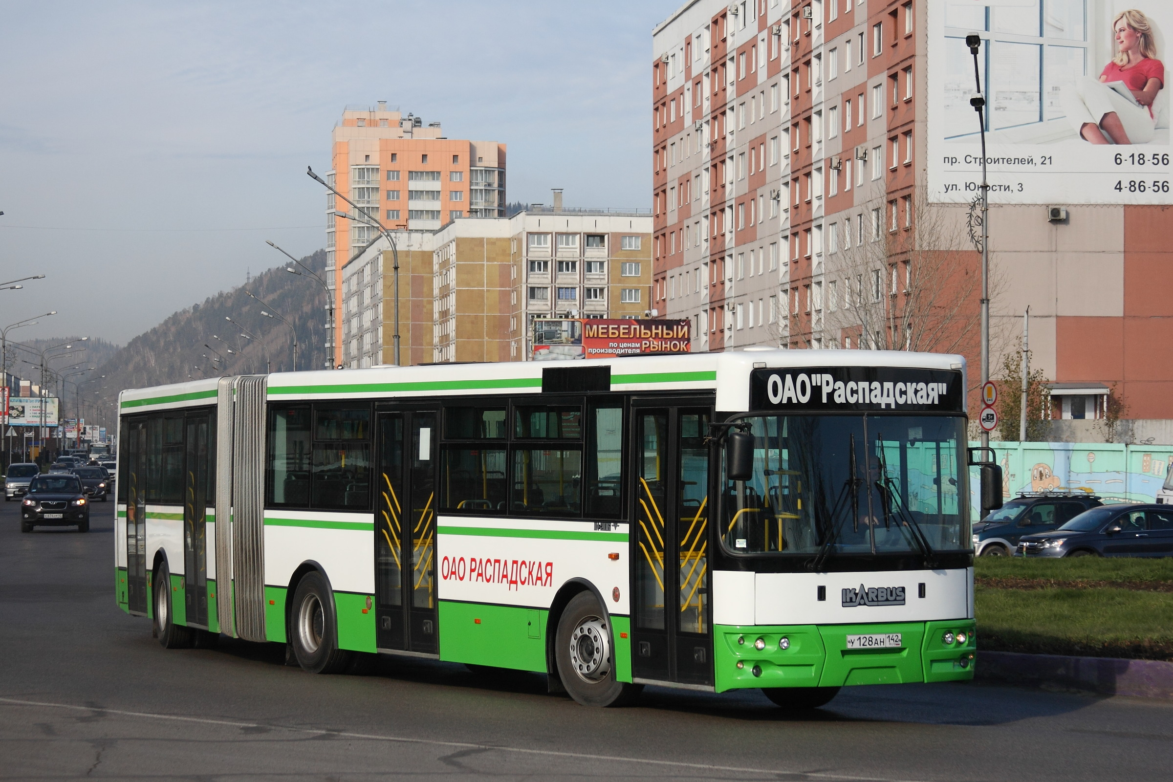 Служебный автобус Ikarbus IK-206 в Междуреченске, Кемеровская область, Россия.